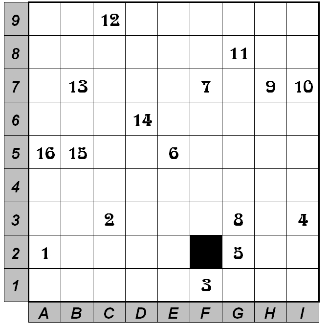 Grille de crops donnée sous la forme de pions numérotés. Ce pions correspond à la position du premier d'une série de cinq (voir le jeu Reptyl qui en est la base)